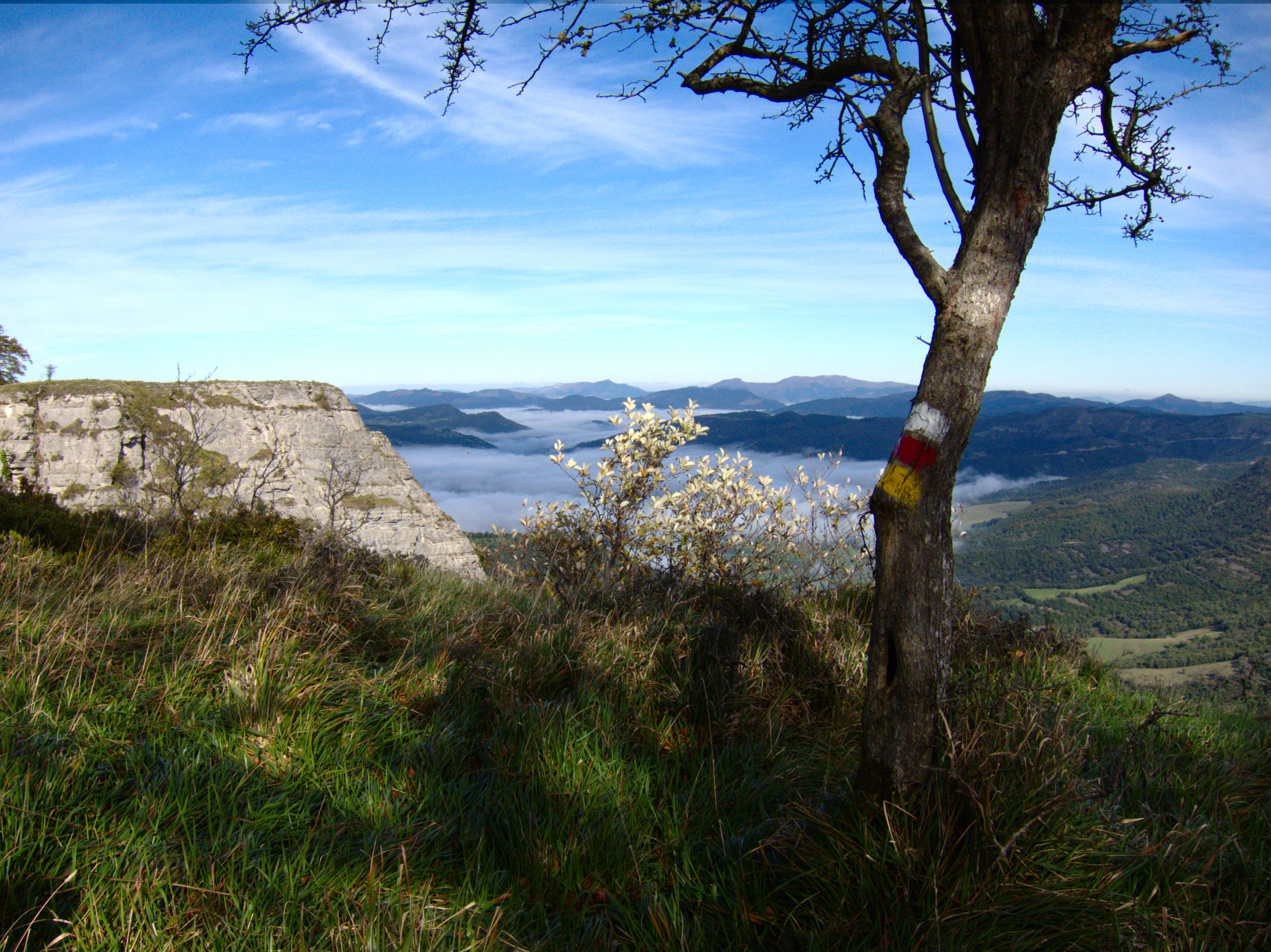 Arrastaria harana (Araba) behelainopean, ibilbideak markatzen dituen zuhaitz baten atzean.